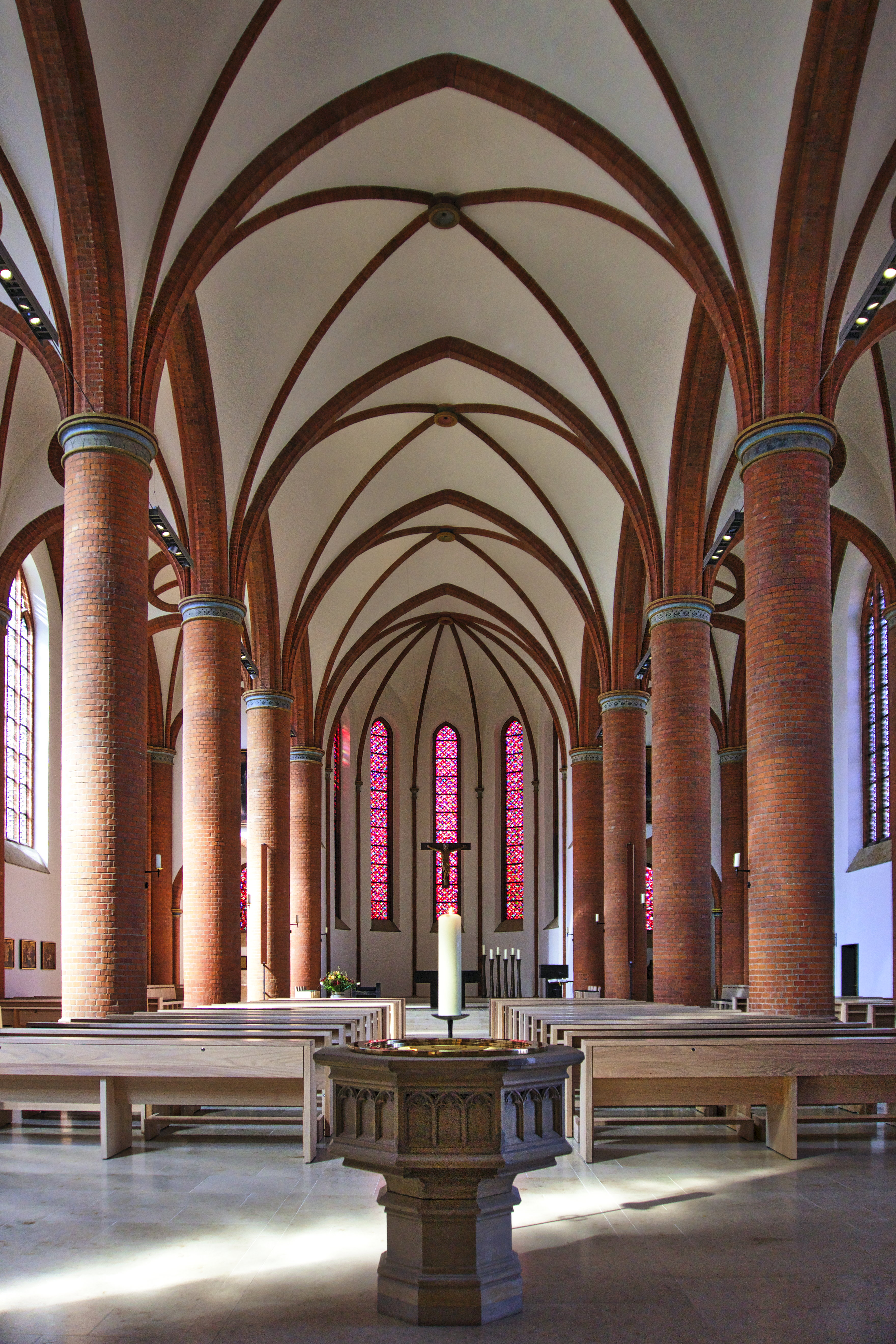 Innenansicht der Propsteikirche Herz Jesu, Lübeck; Aufnahme in Richtung Westen, April 2015